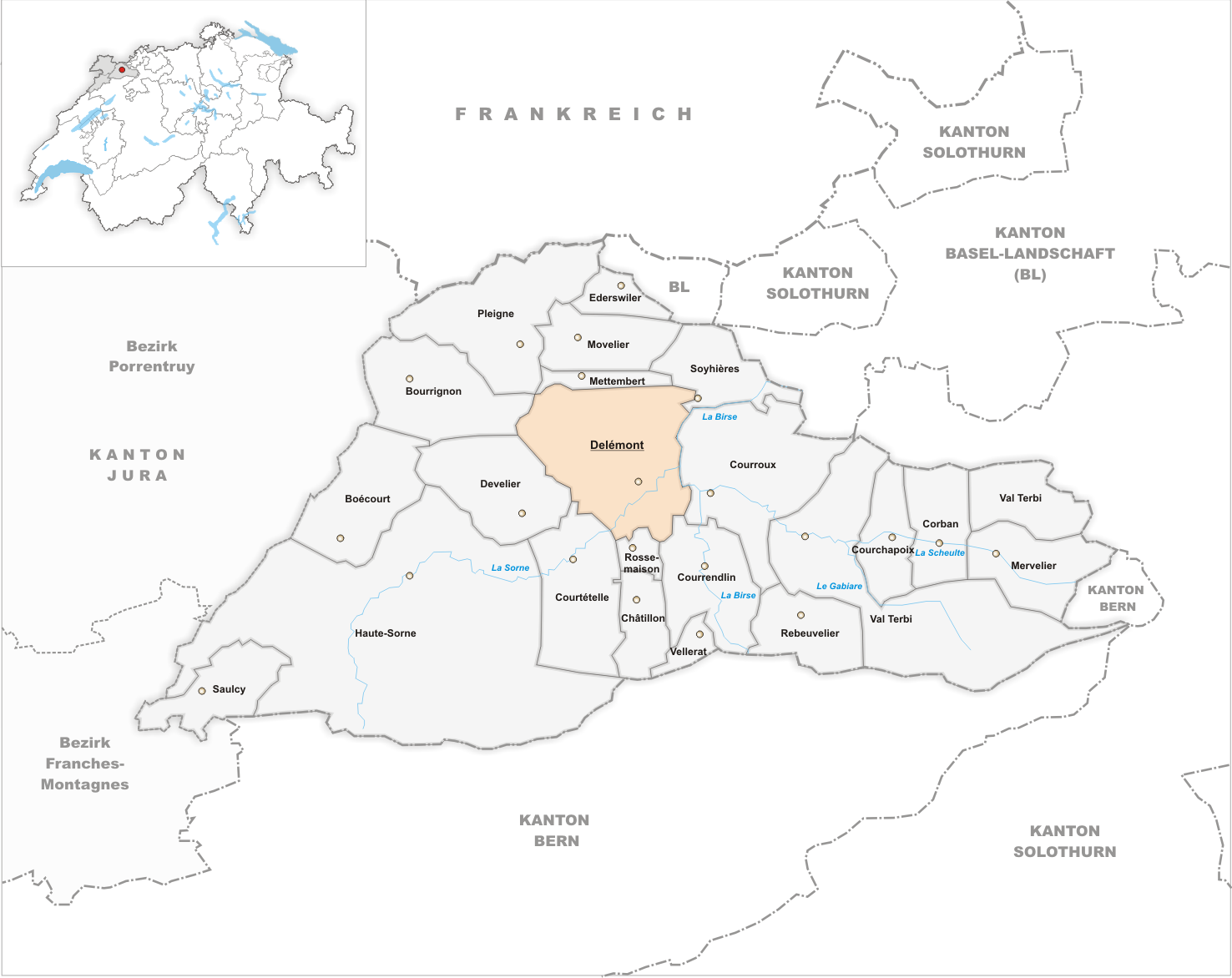 Municipality Delémont